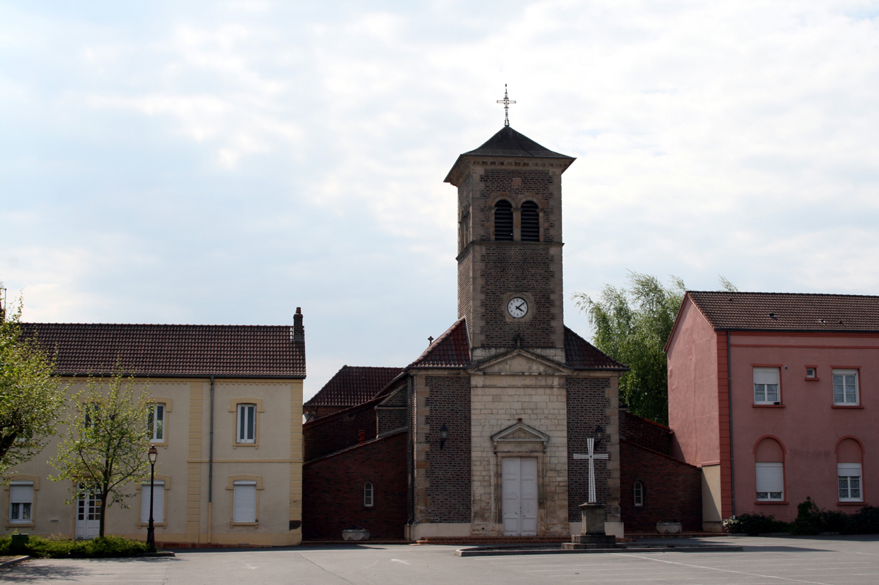 Place Roger Salengro à Montchanin les Mines